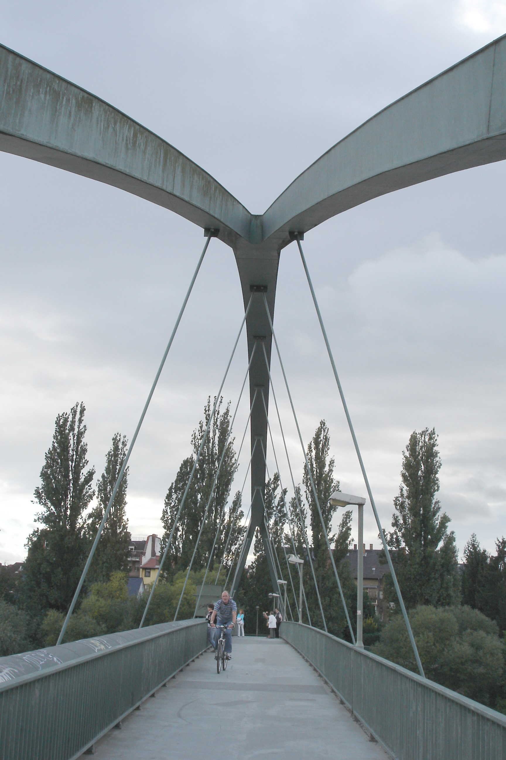 Arthur-von-Weinberg-Steg, Detail